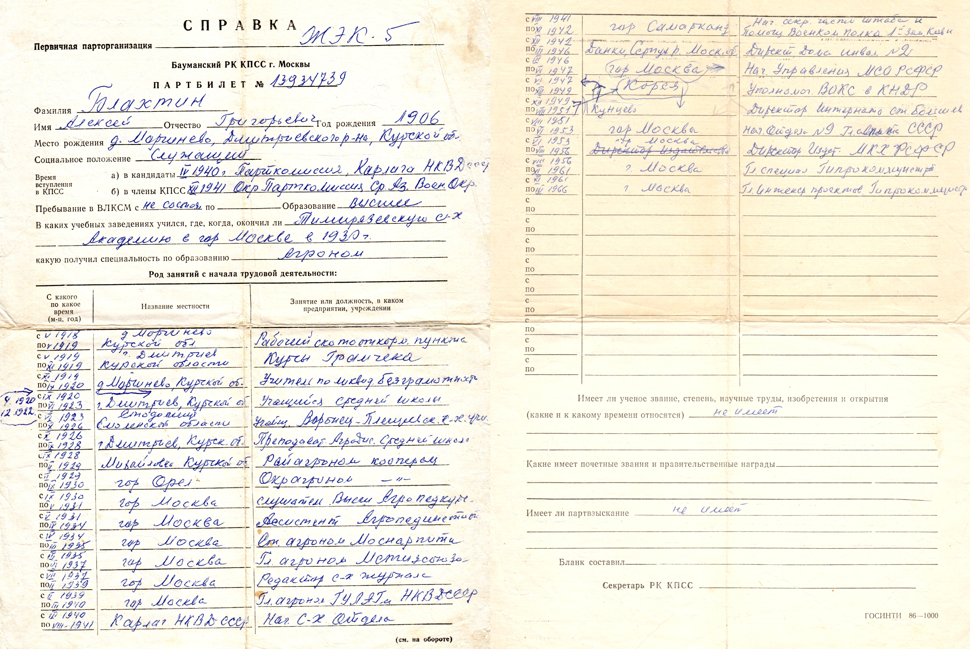 Анкета Алексея Григорьевиач Блахтина (1906—1986) в Бауманском РК КПСС, 1966.